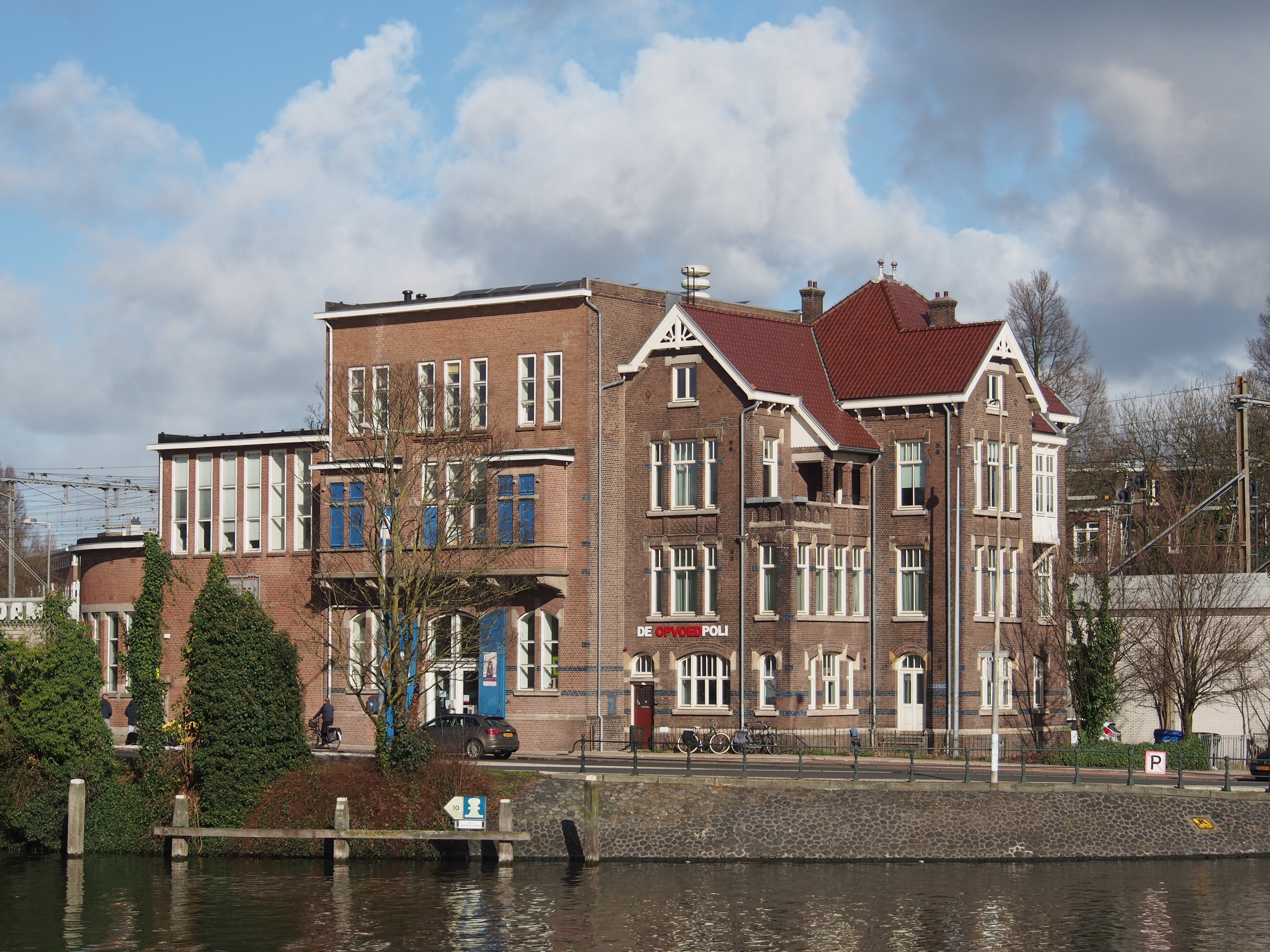 Foto genomen in Amsterdam.